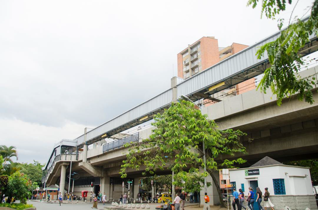 Estación Santa Lucía (Metro de Medellín)